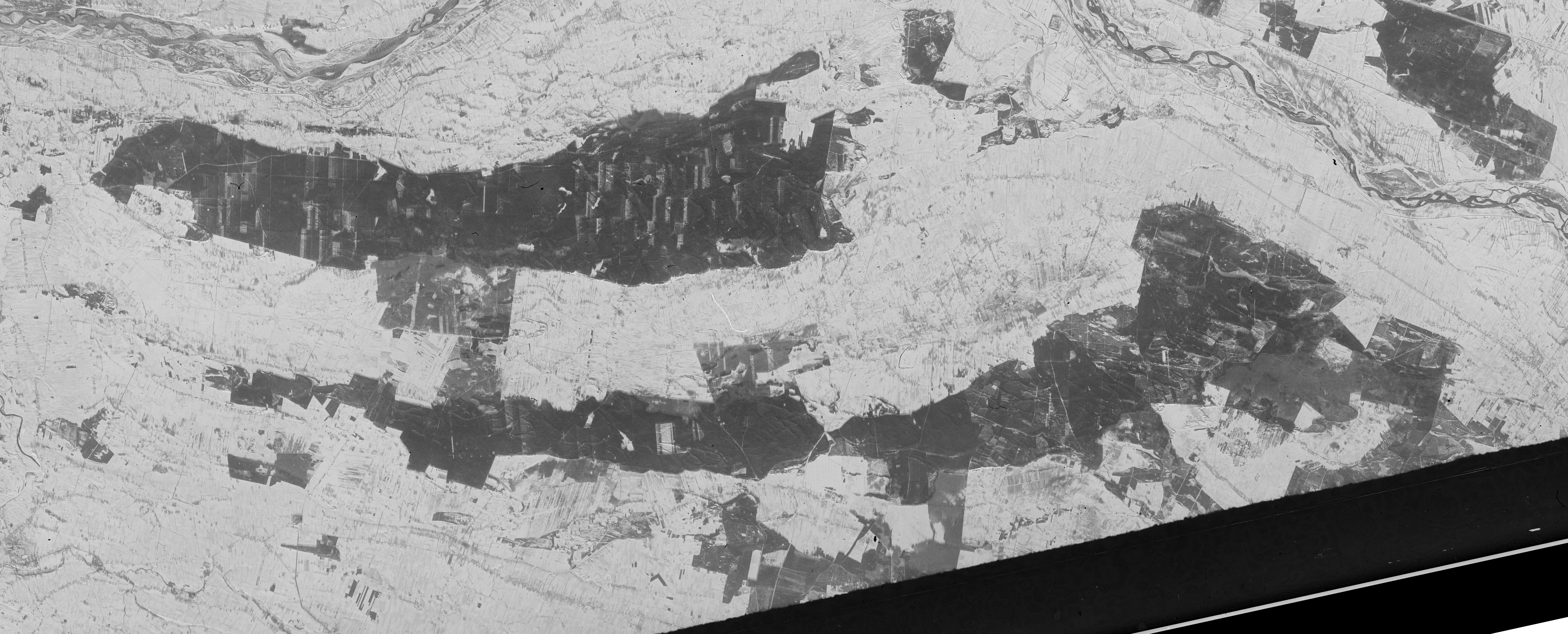 Zdjęcie satelitarne kompleksu leśnego Puszcza Kampinoska wykonane między 12 a 16 grudnia 1961 przez amerykańskiego satelitę wywiadowczego Discoverer 36. Zdjęcie stanowi fragment części ai b klatki nr 40. Zdjęcie odbite lustrzanie w obu kierunkach i obrócone tak, aby odzwierciedlało rzeczywiste położenie sfotografowanych obiektów. Zdjęcie w pełnej rozdzielczości.